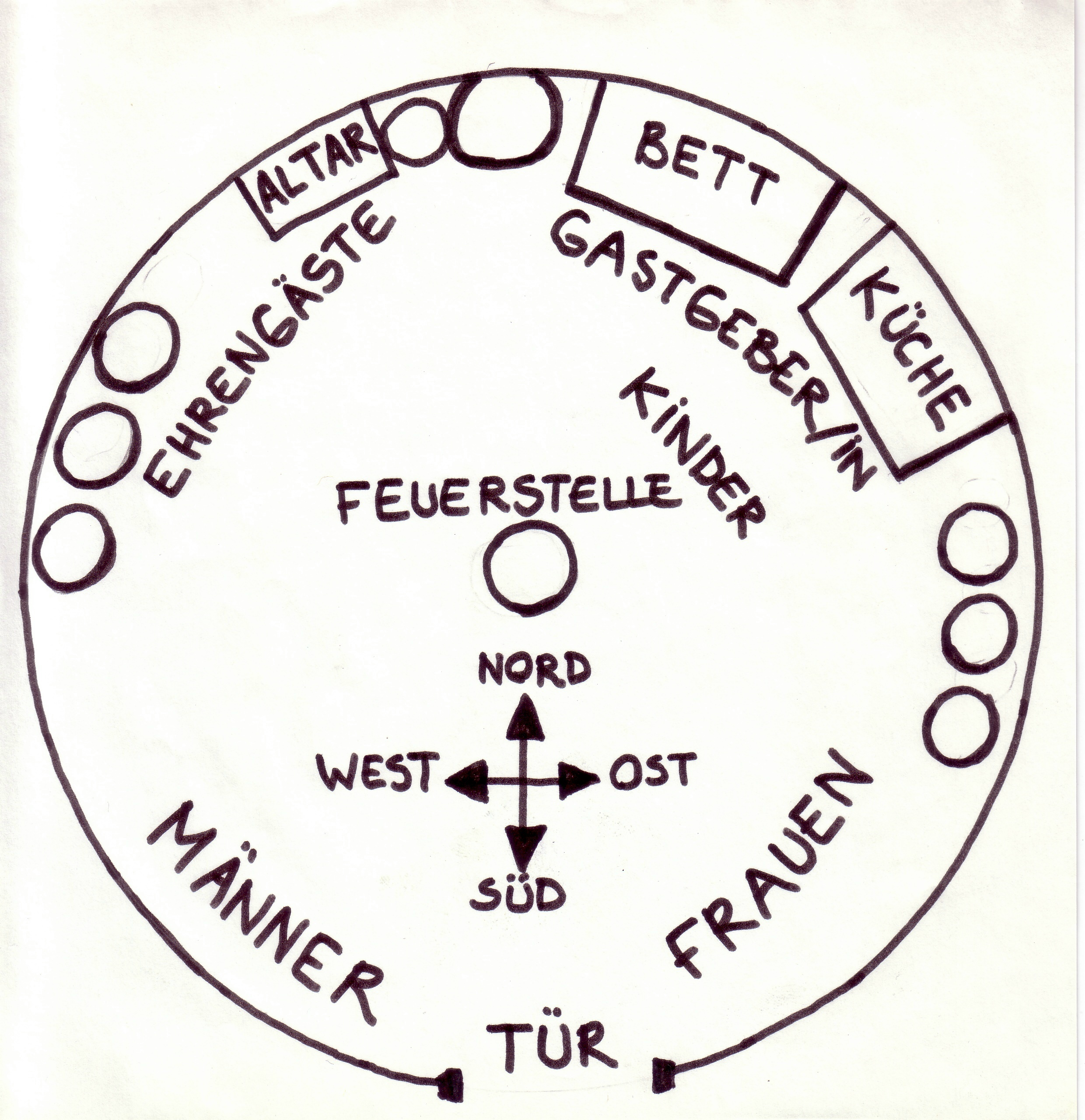 Das Bild habe ich selber gezeichnet und die nötigen Informationen dazu habe ich aus den folgenden Quellen: Die tengristische Sitzordnung in zentralasiatischen Nomadenzelten wird in diesem Skript der Harvard University Central Asia Studies- Harvard Uni. auf den Seiten 6 und 7.. ..und hier unter Ger and the Sacred Circle Julie Stewarts beschrieben. Auf dieser mongolischen Webseite findet sich eine ähnliche Darstellung highaltai, vobei ich darauf geachtet habe nicht dasselbe Bild haargenau nachzubilden. --Erdal 01:03, 11. Apr 2006 (CEST)